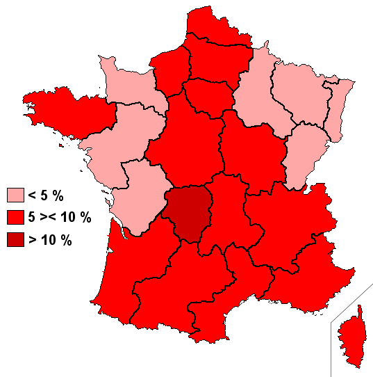 Résultats obtenus par le Front de gauche pour changer d'Europe au niveau des régions françaises.